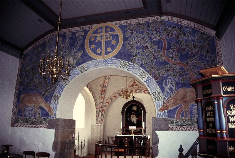 Linnerup kirke ligger i Linnerup Sogn, i det tidligere Vrads Herred Skanderborg Amt, nuværende Hedensted Kommune, Region Midtjylland. Kirken var muligvis viet til Sankt Peter i middelalderen. Kirken blev opført i romansk tid med blev næsten nybygget i forbindelse med en restaurering i 1866, d